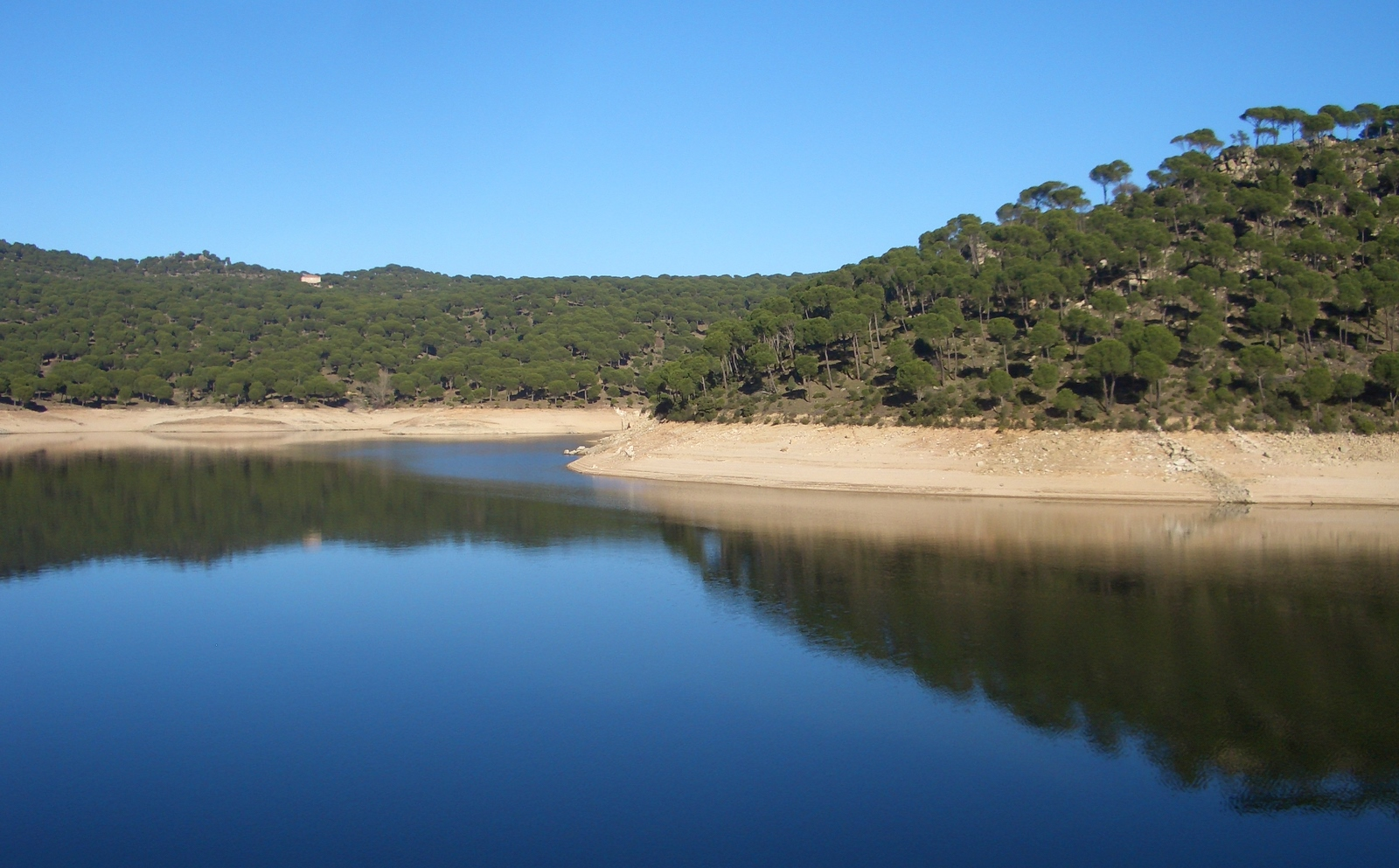 San Juan Reservoir / Embalse o pantano de San Juan. San Martín de Valdeiglesias, Community of Madrid, Spain